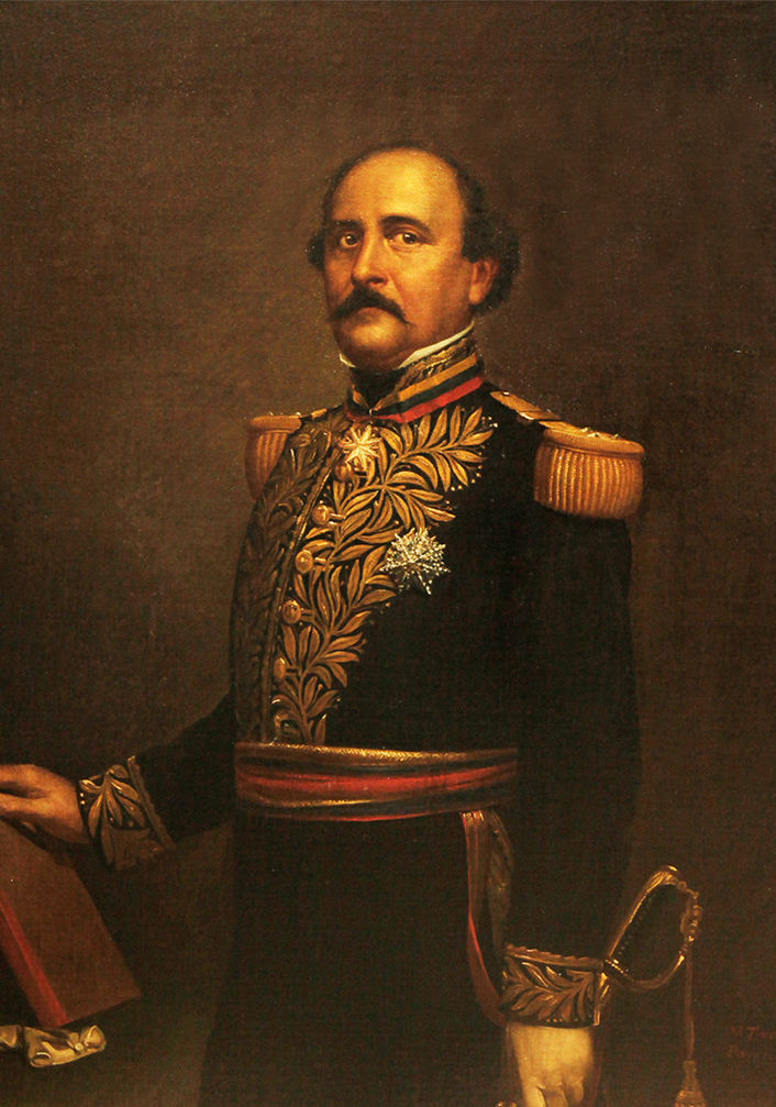 Juan Crisostomo Falcon. Oleo/ Tela. Minsterio de Relaciones Exteriores. Caracas Venezuela